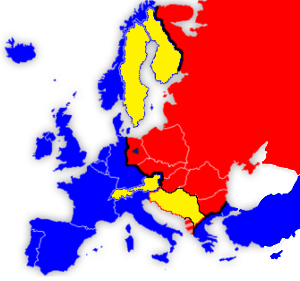 Carte Otan, Pacte de Varsovie, et pays neutre de l'Europe avant 1989